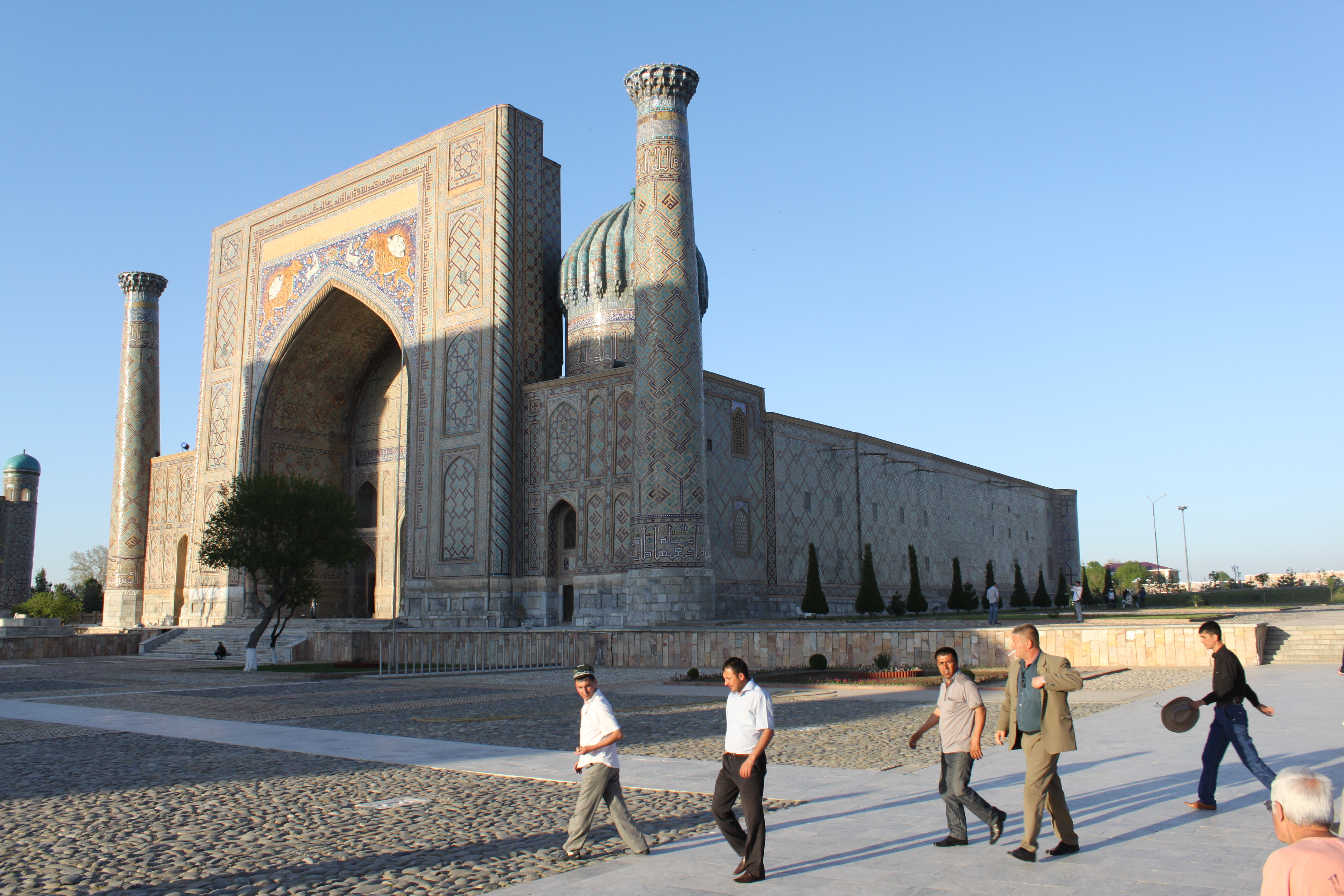 Vue extérieure de la madrasa Cher-Dor